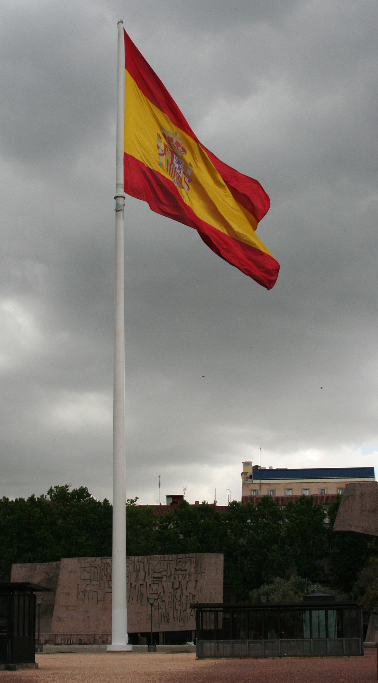 Bandera de España en la Plaza de Colón en Madrid. La más grande izada en España.